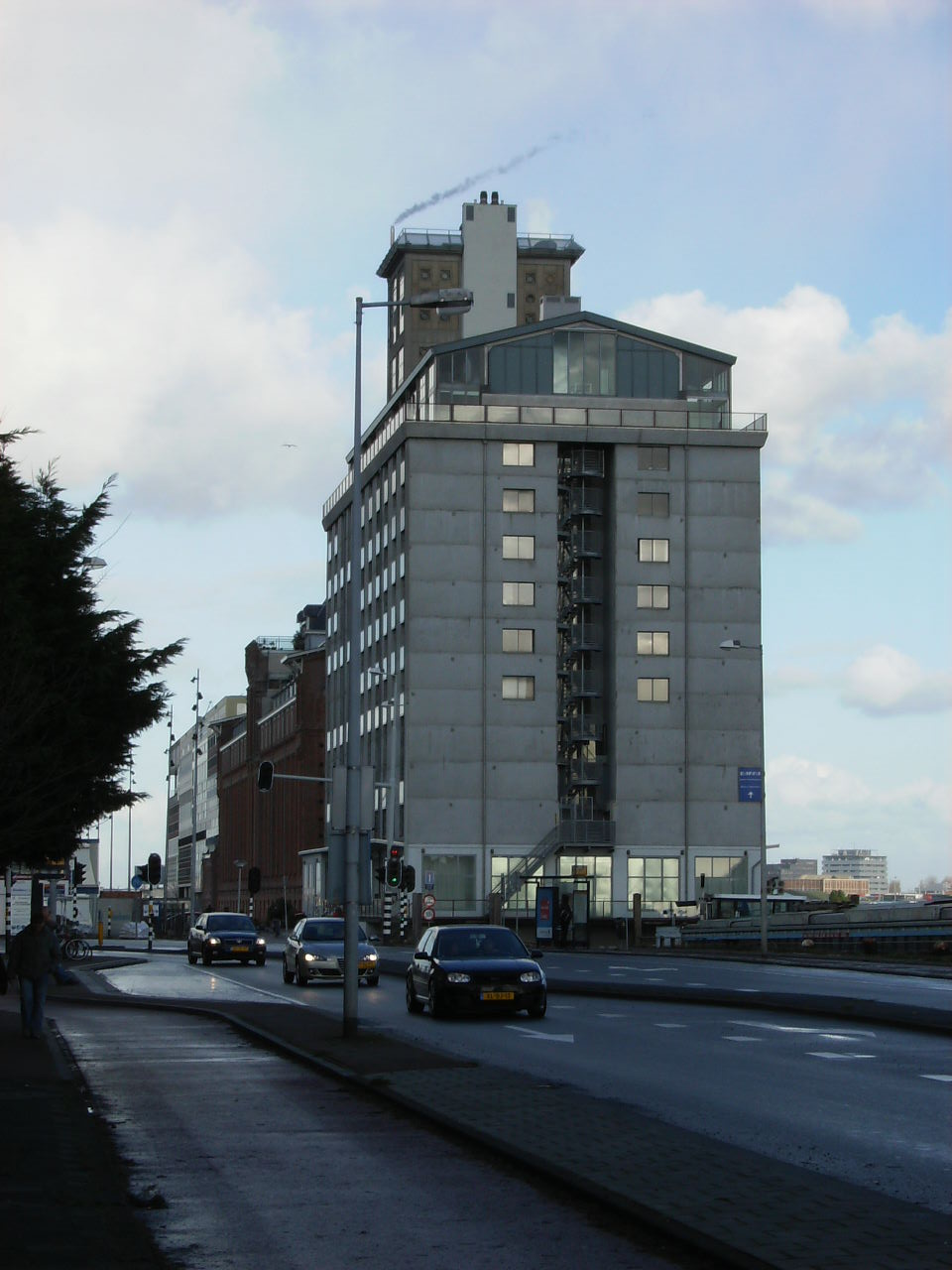 Amsterdam Silodam Graansilo Amsterdam, grain elevator